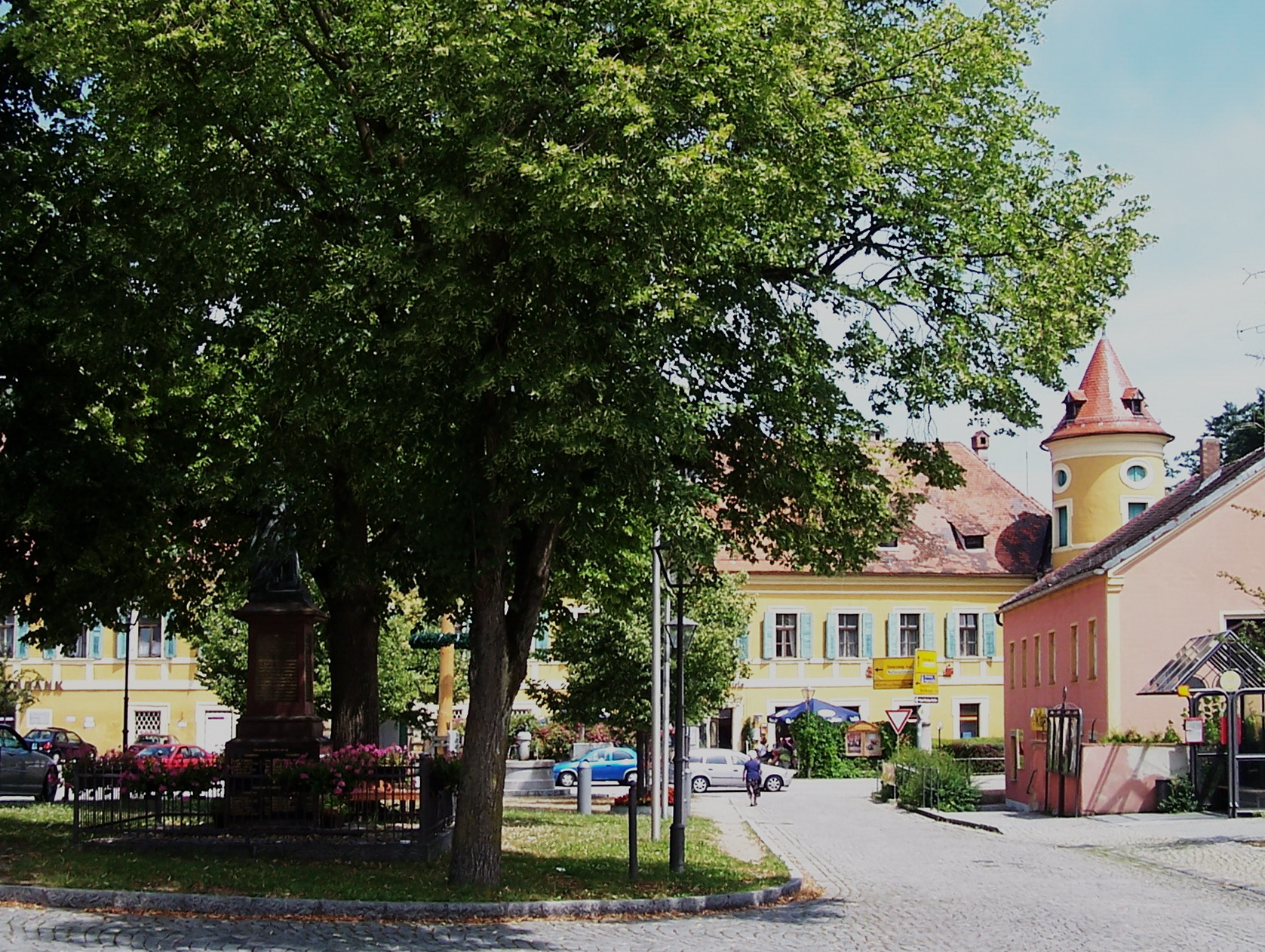 Wiesent. Nähe Schloßplatz. Kriegerdenkmal für 1870/71, 1914-18, 1939-45 Bronzefigur auf Inschriftpfeiler, Sandstein, 1895 von Josef Schöpperl, 1919 erhöht.